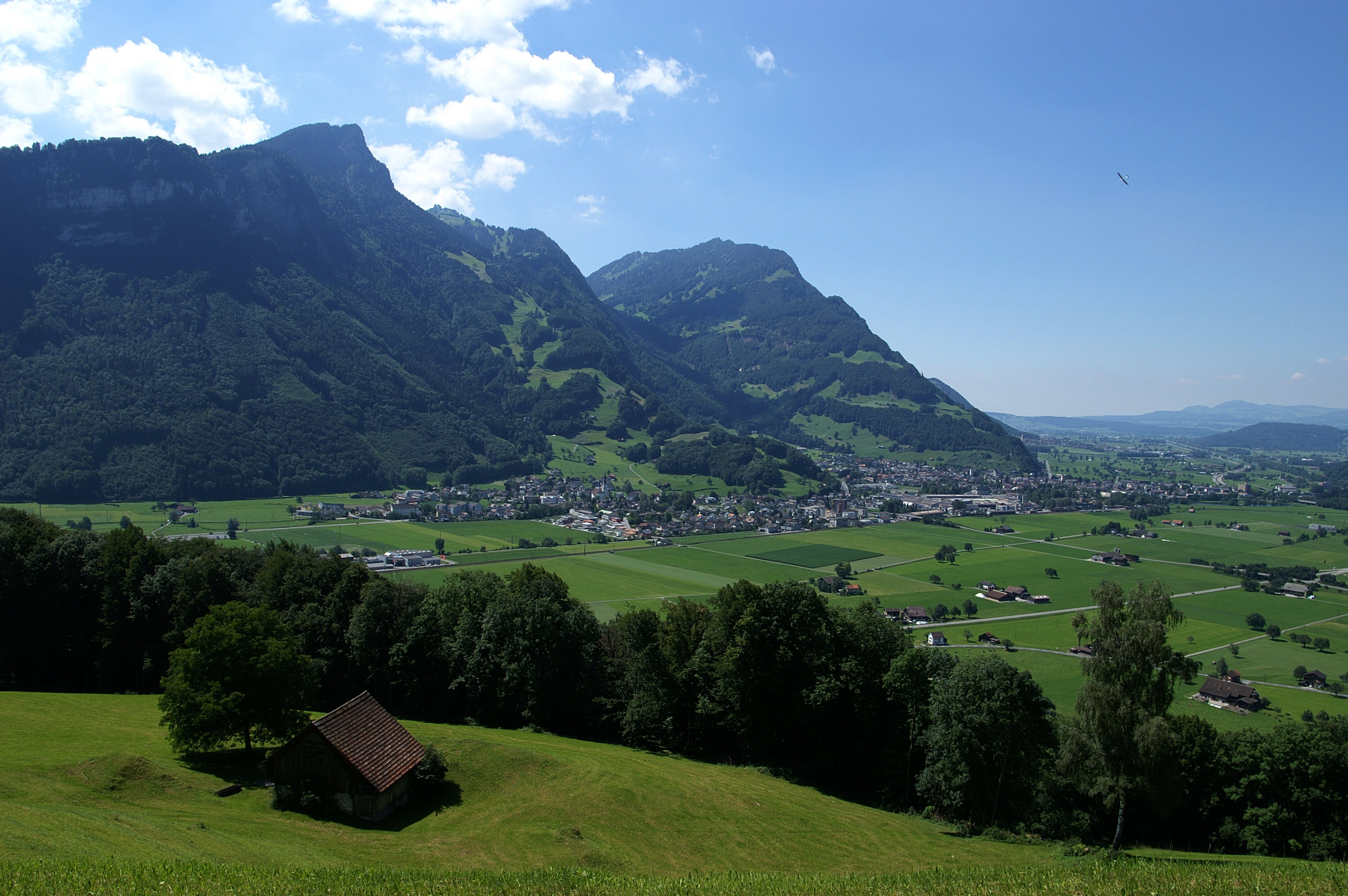 Blick von der Kerenzerstrasse auf die Gemeinden (v.l.n.r.) Oberurnen, Niederurnen und einem Ortsteil von Ziegelbrücke. Die Autobahn A3 führt nach Zürich.